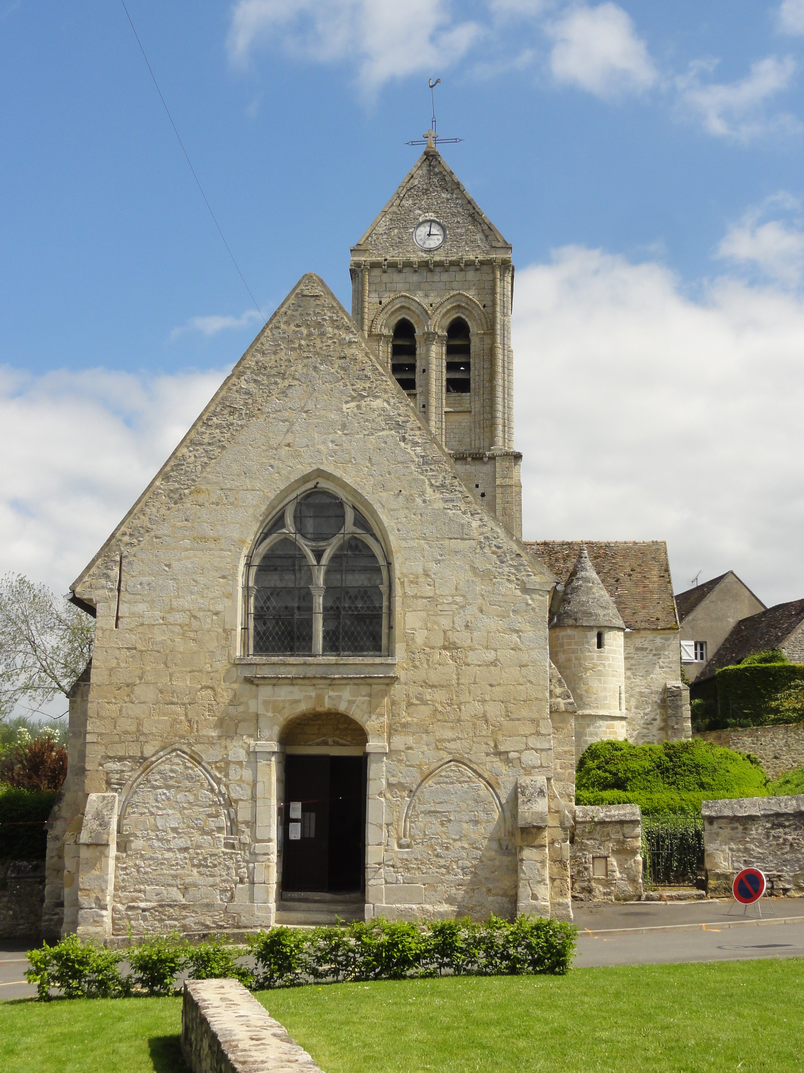 Église Saint-Léger de Delincourt - voir titre.